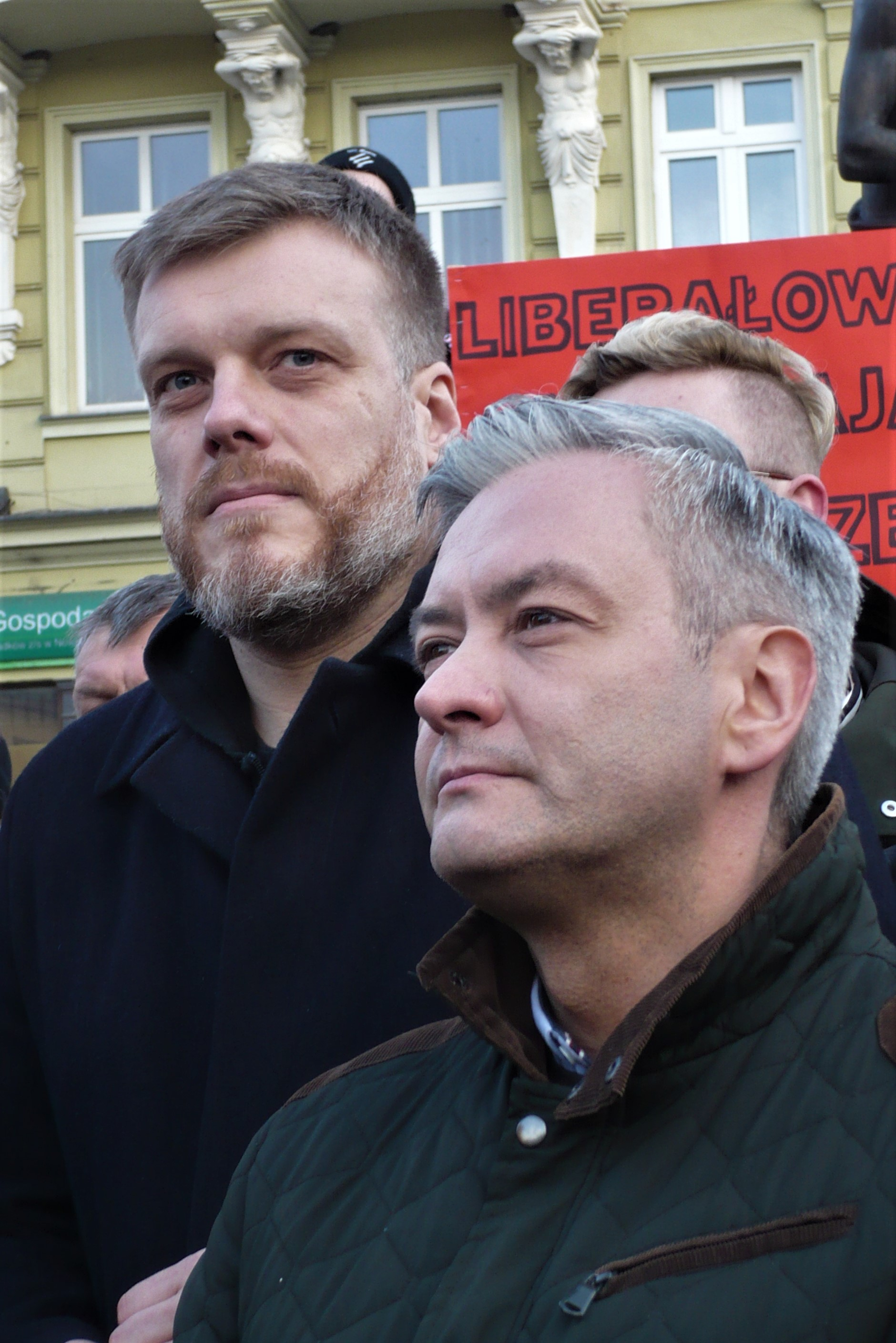 Protest przeciwko likwidacji oddziału wewnętrznego szpitala w Nowej Rudzie z udziałem: Roberta Biedronia, Adriana Zandberga, Agnieszki Dziemianowicz-Bąk, Marka Dyducha. Rynek, Nowa Ruda, 09.02.2020 r.